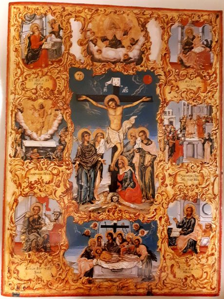 Сборна икона от Тома Вишанов, митрополитската църква в Благоевград, 1818.